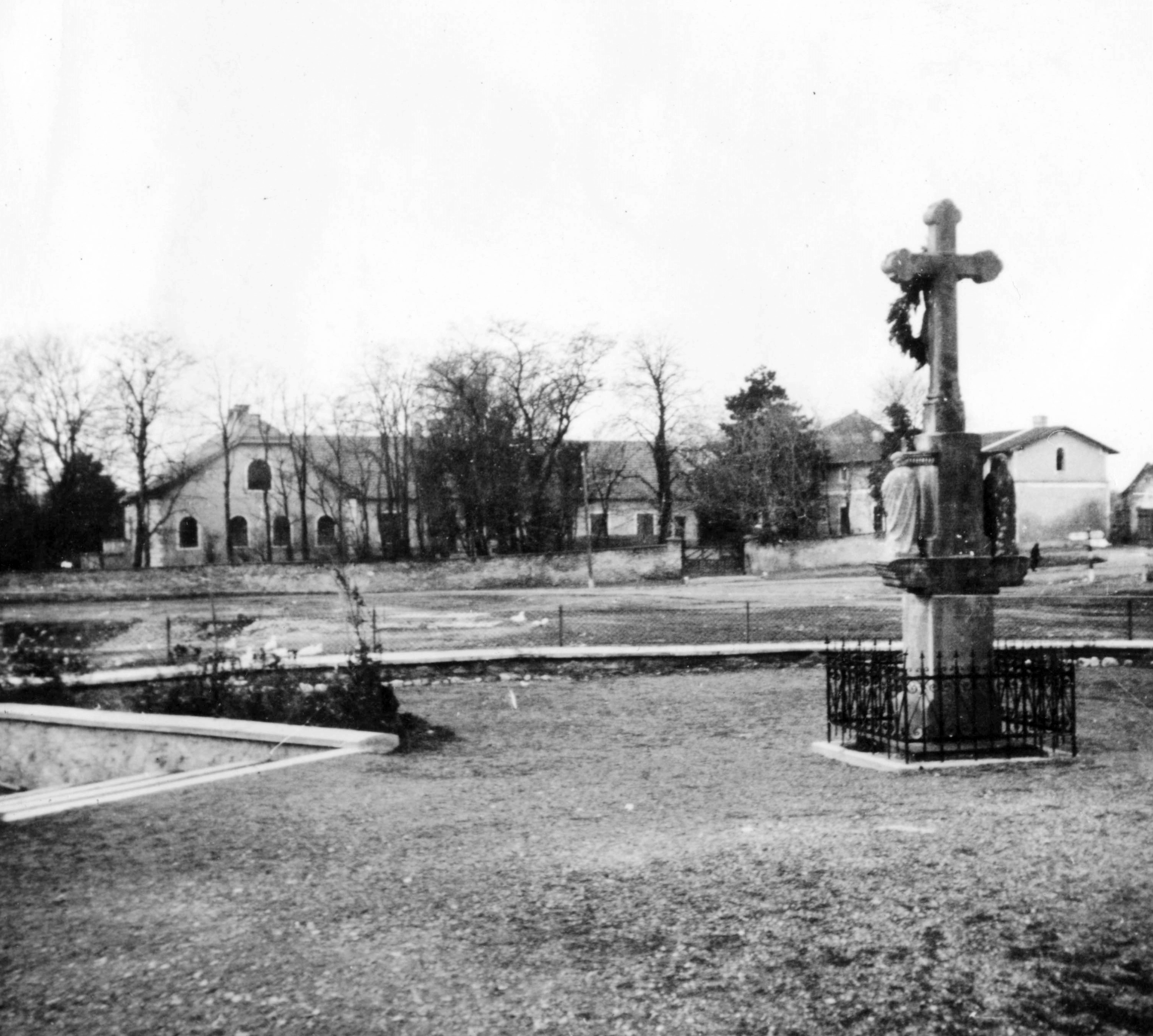 Petőfi Sándor tér. Location: Hungary, Zalahaláp Title: Petőfi Sándor tér.